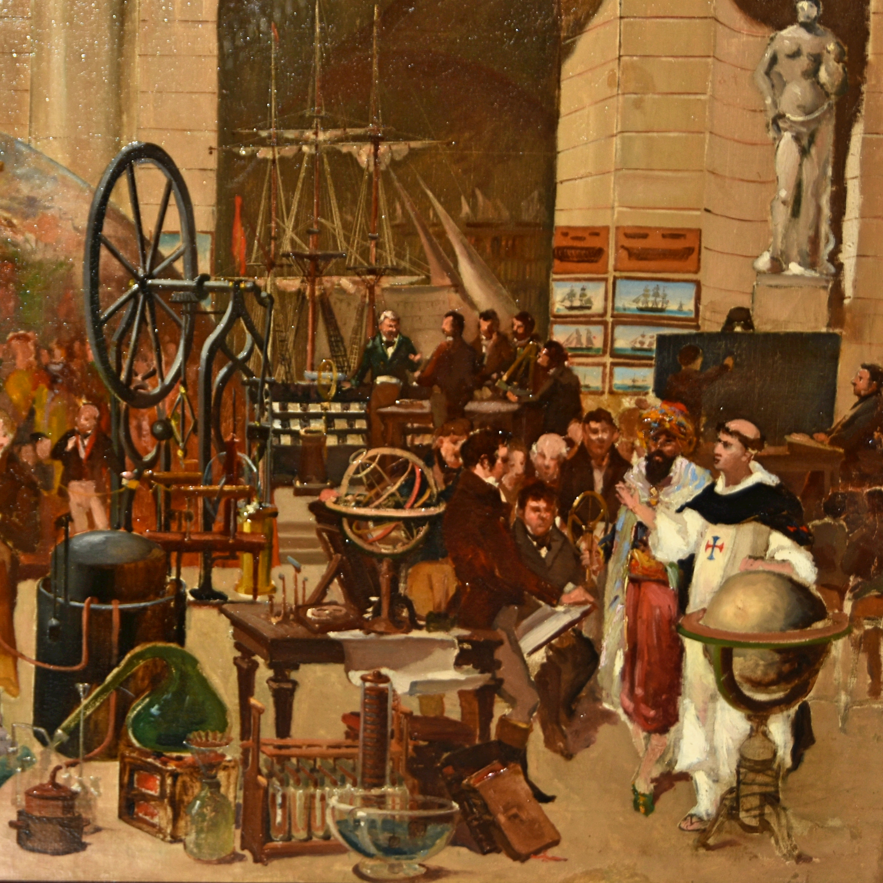 Emili Casals Camps. L'escola de Nàutica de la Junta de Comerç Detall del quadre "Visita dels reis Ferran VII i Maria Amàlia a Llotja l'any 1827" (Museu d'Història de Barcelona MUHBA)